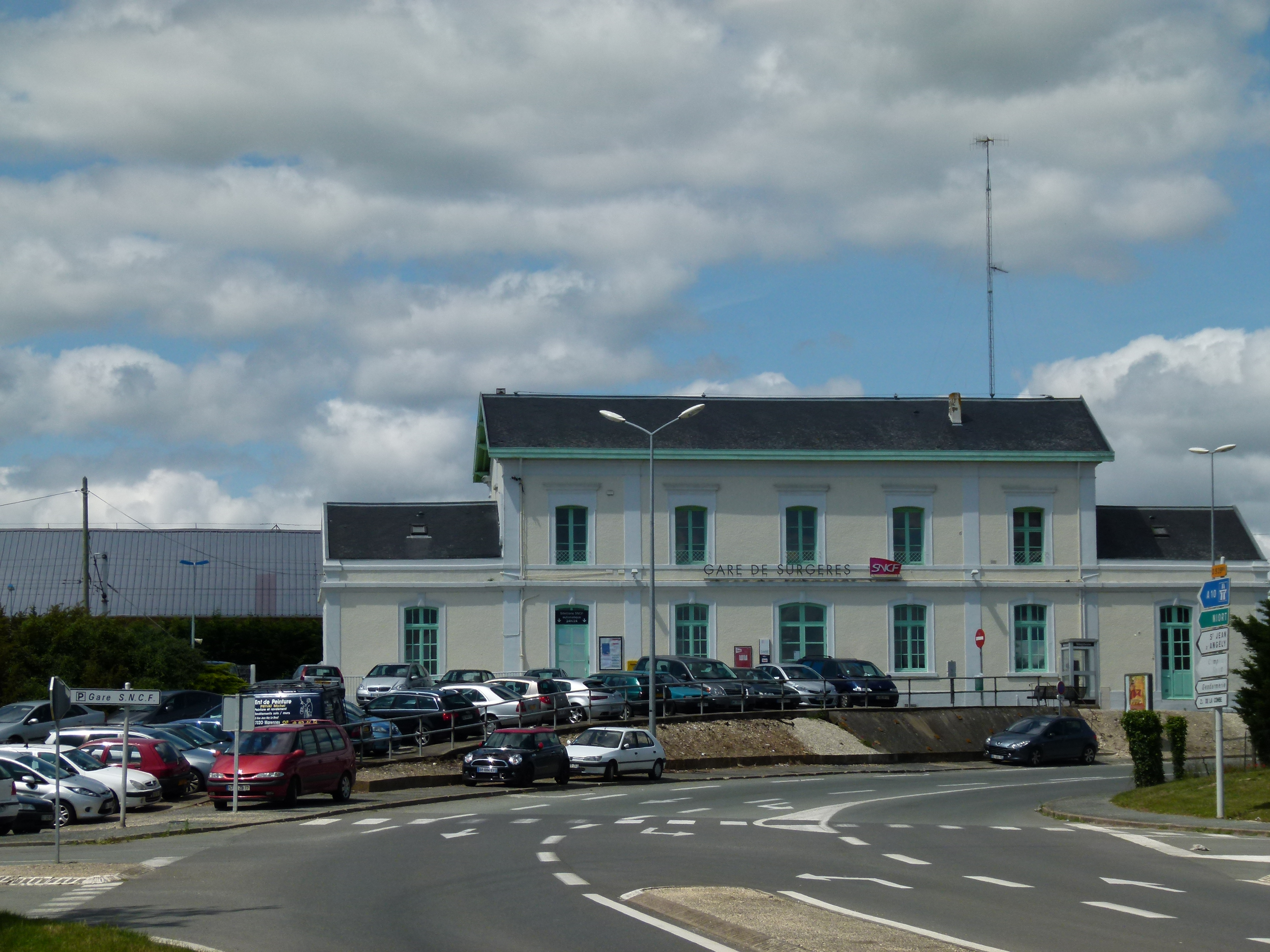 Façade sud de la gare SNCF de Surgères.